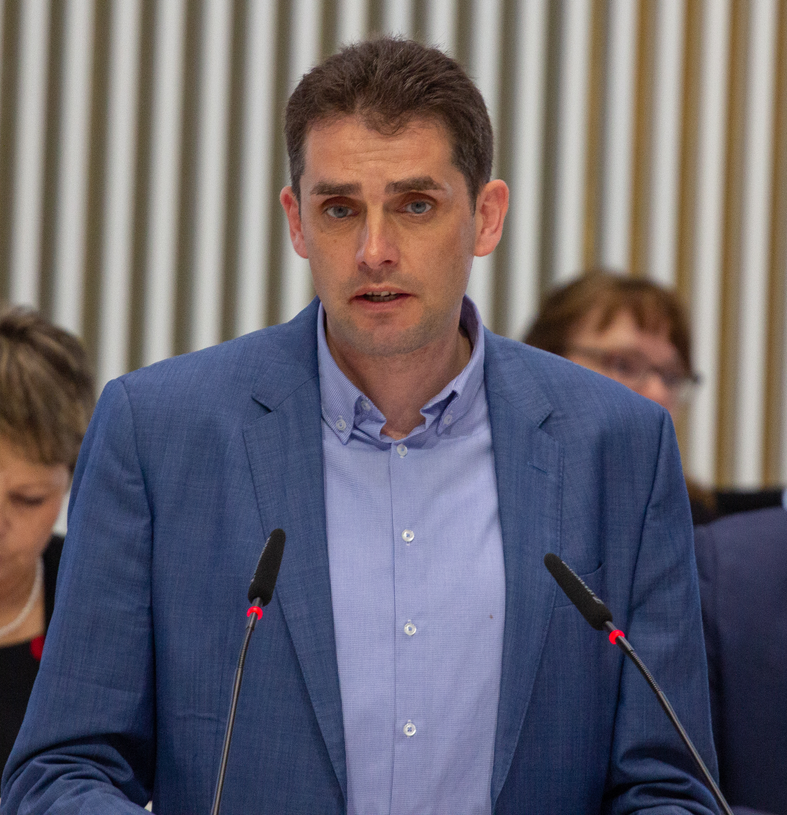 Marc Reinhardt im Plenum des Landtages Mecklenburg-Vorpommern im März 2019.